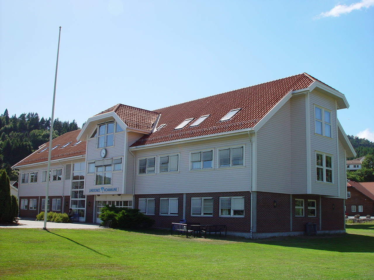 Lindesnes kommunes administrasjonsbygg